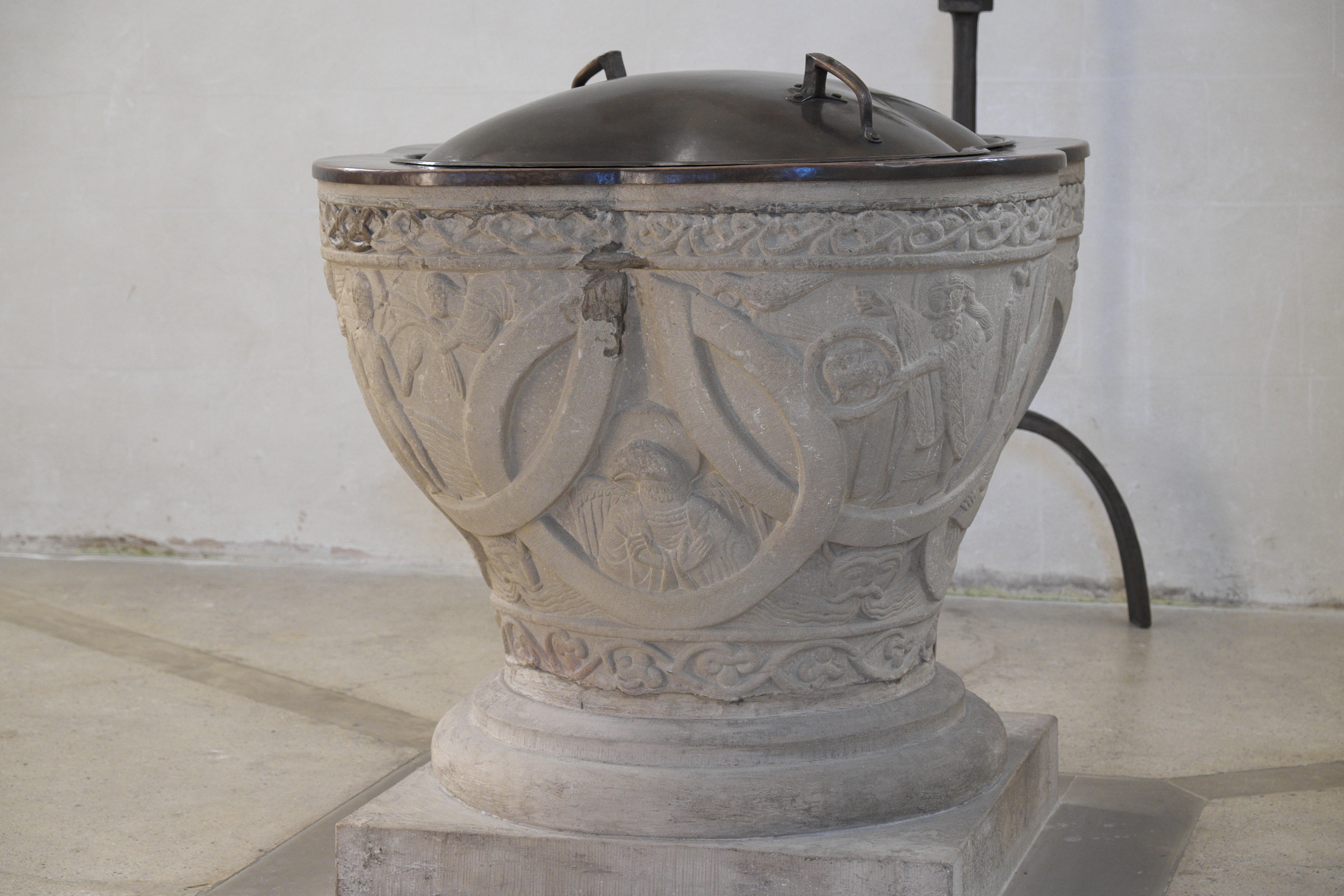 Katholische Pfarrkirche, Basilika St. Michael, in Altenstadt bei Schongau im Landkreis Weilheim-Schongau (Bayern/Deutschland), romanisches Taufbecken